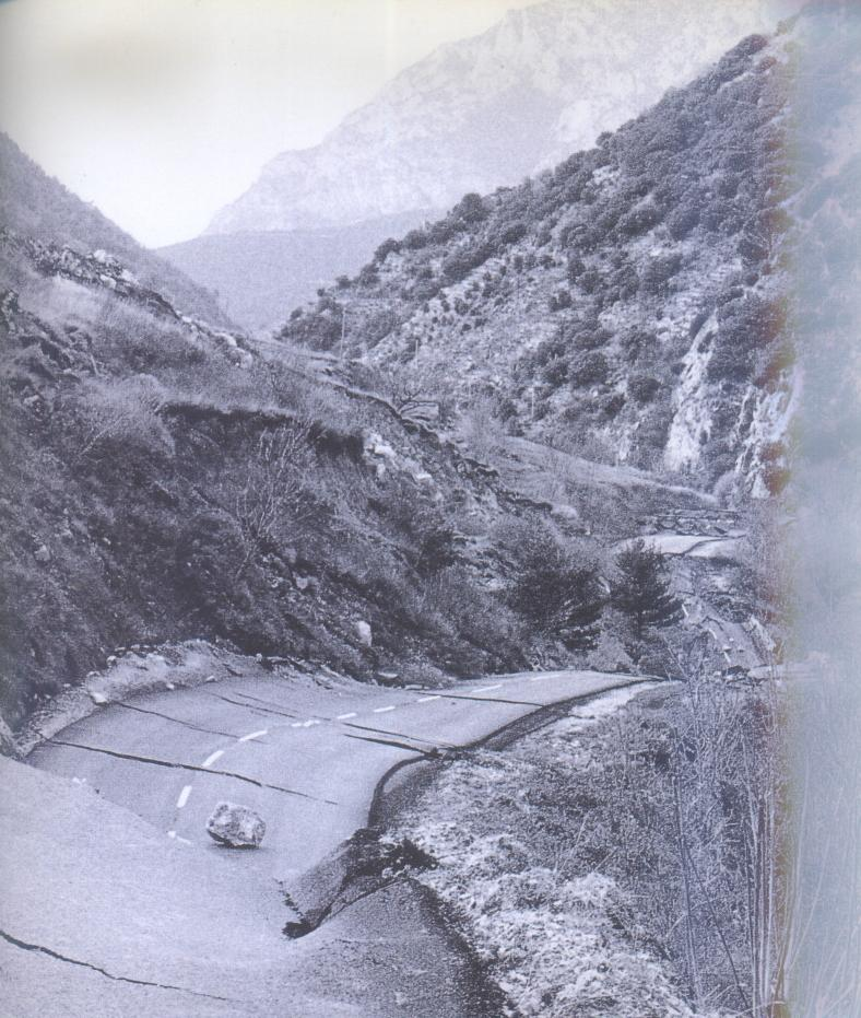 Aiguats del 1982